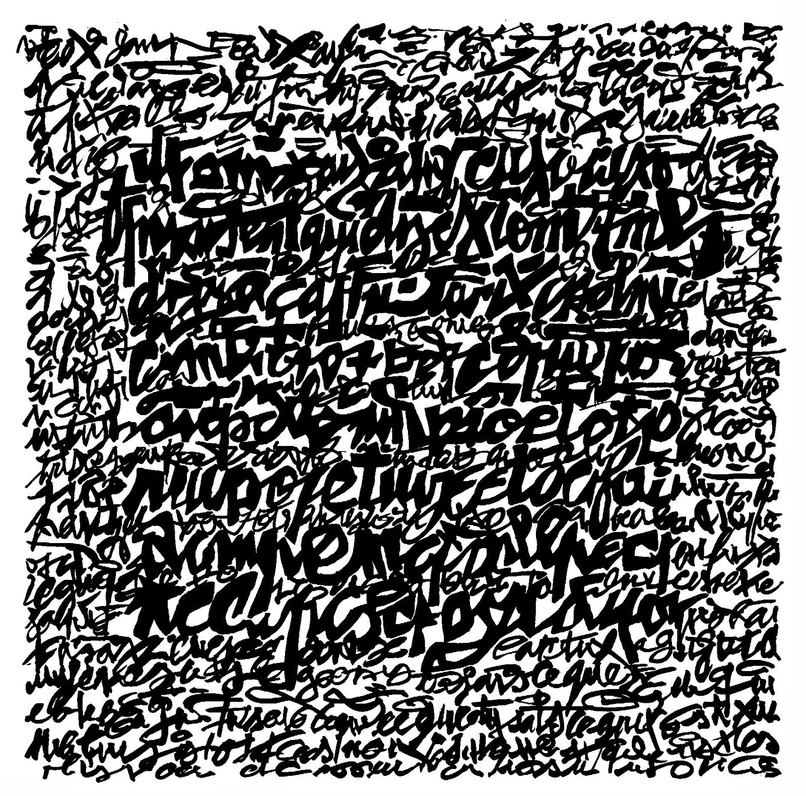 Acrylique sur toile